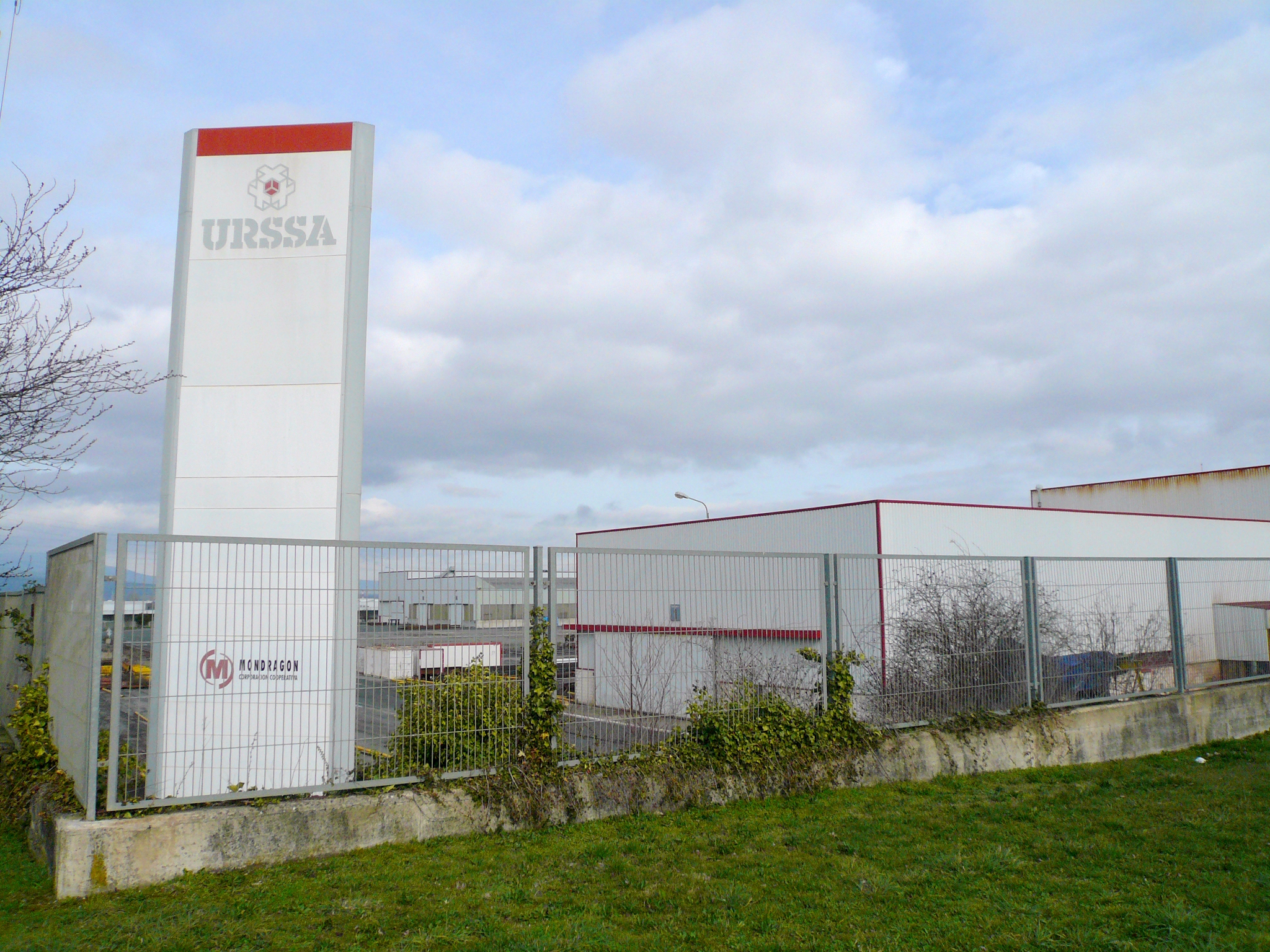 URSSA (Corporación Mondragón), Parque Empresarial Jundiz (Vitoria)